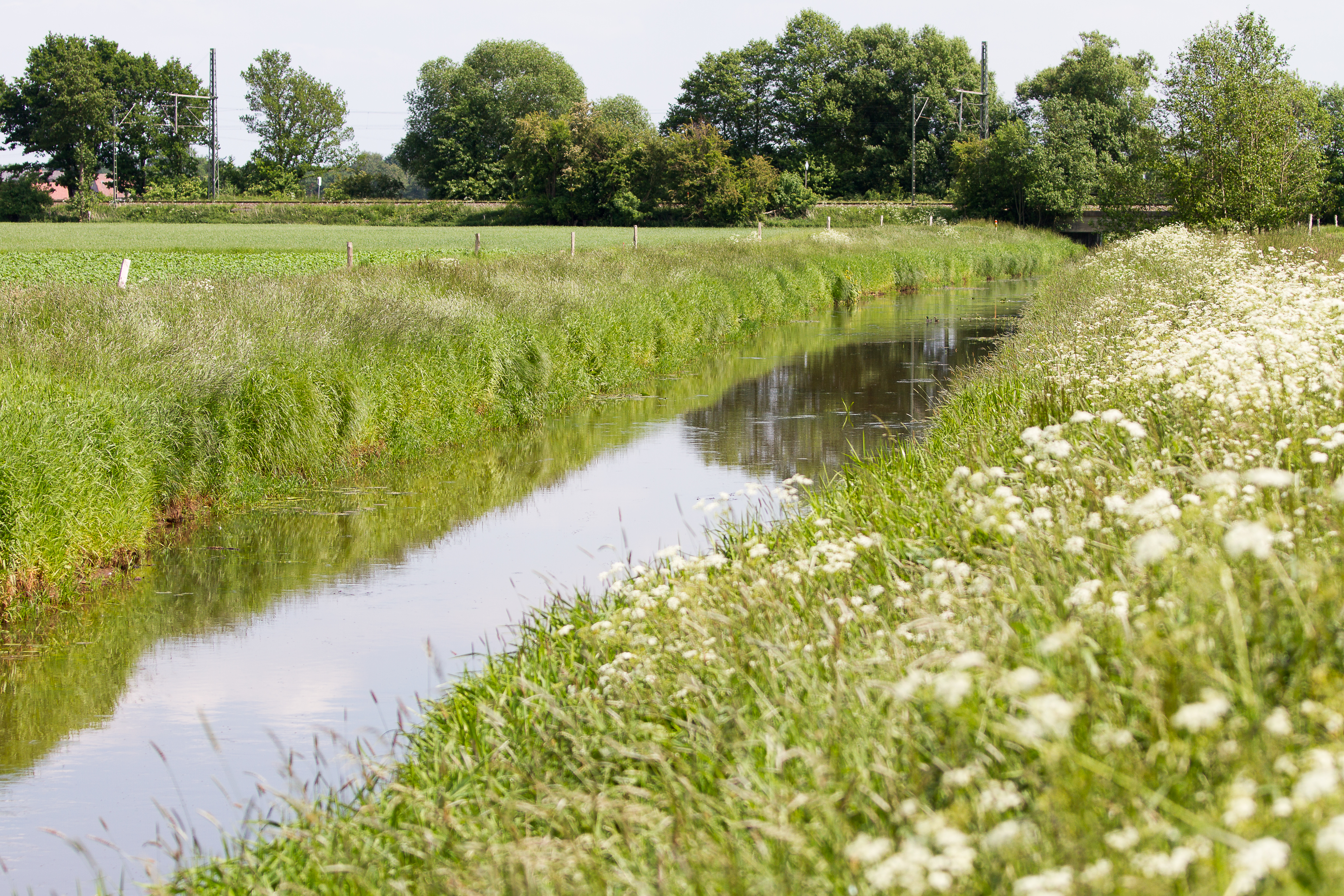 Nebenfluss der Hunte